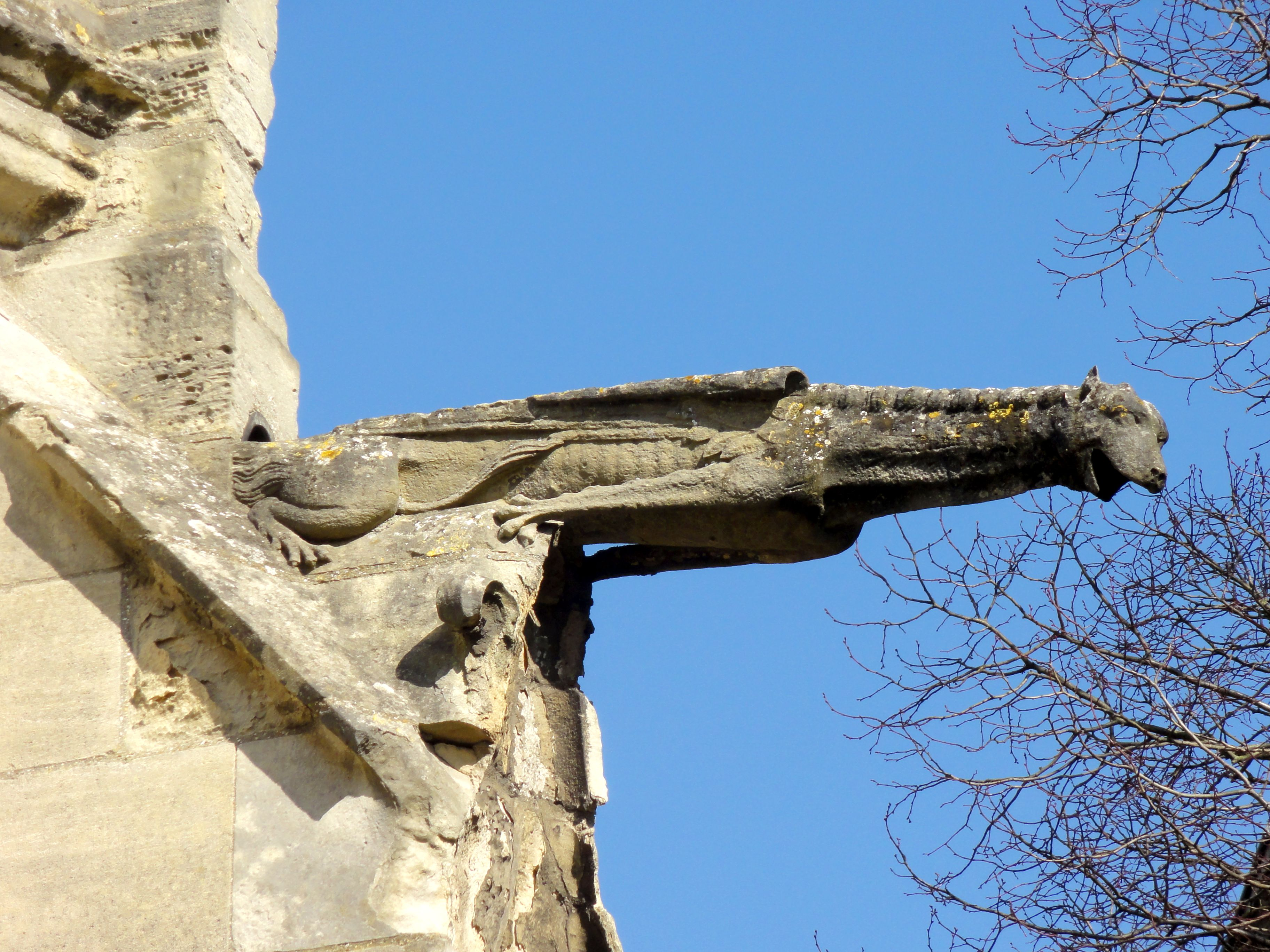 Chœur, gargouille.